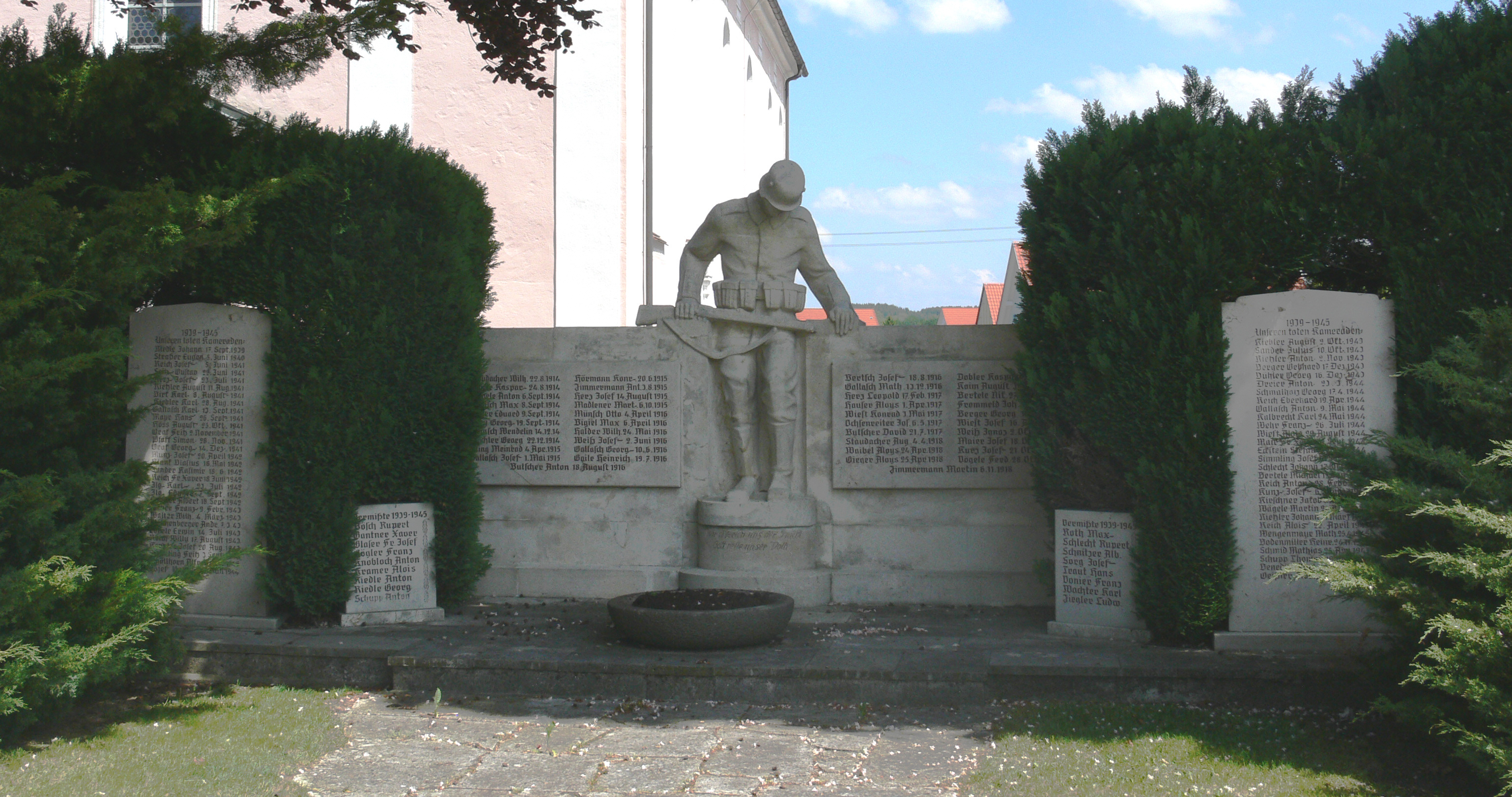 Kriegerdenkmal in Aitrach, Landkreis Ravensburg Siehe auch